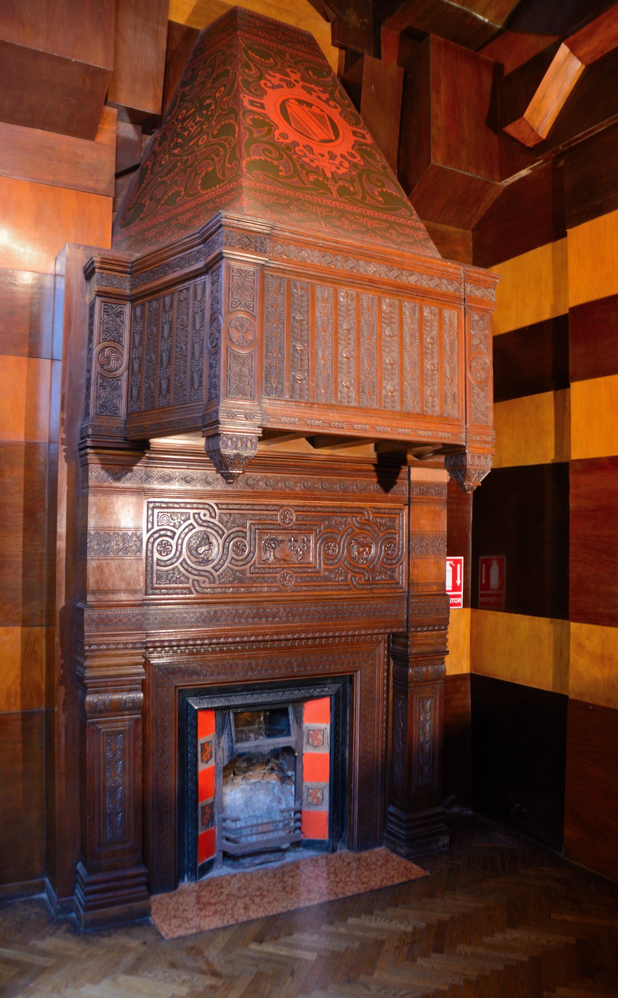 Detalle del interior del Castillo Pittamiglio estufa